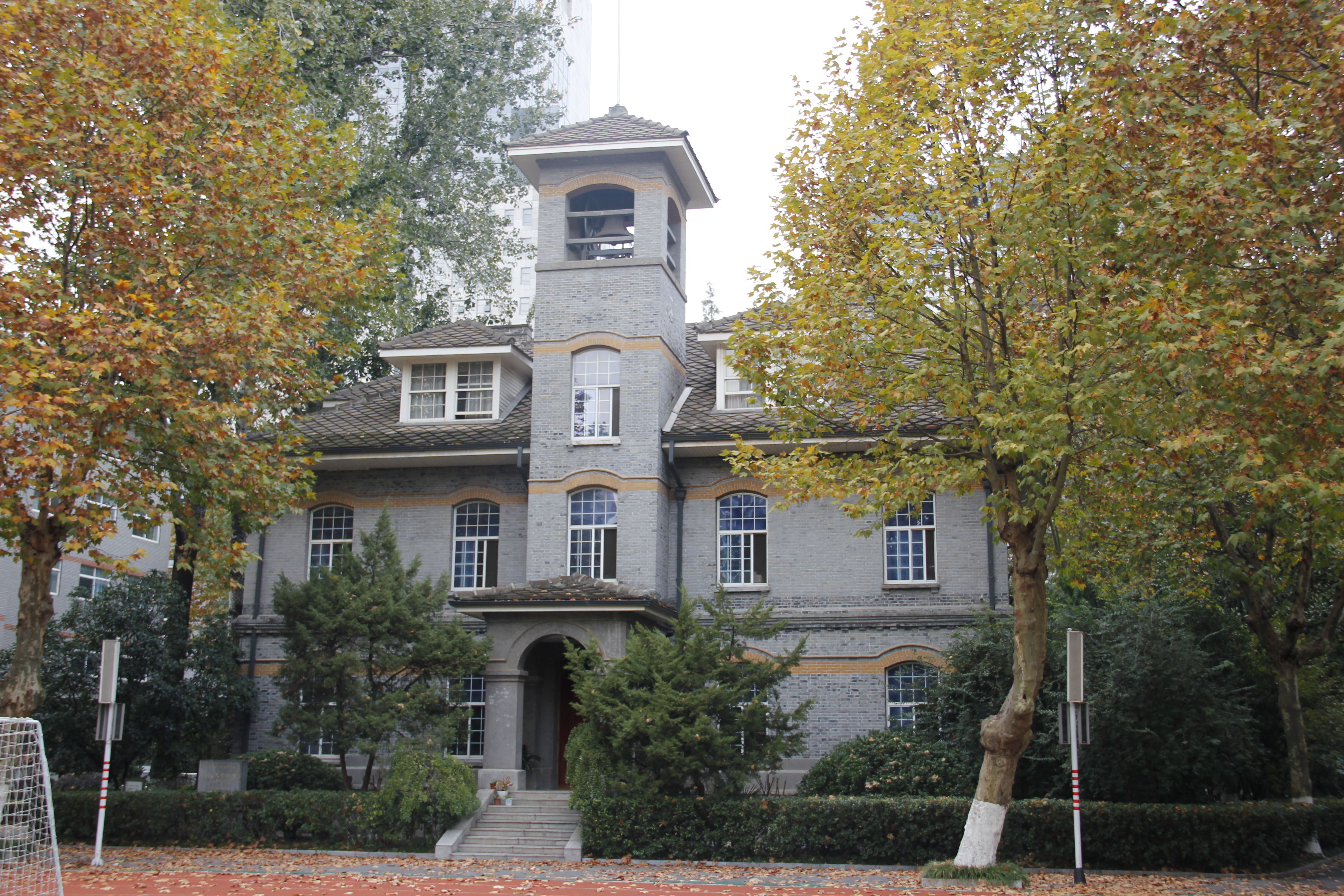 南京市金陵中学-汇文书院钟楼，2017年摄。